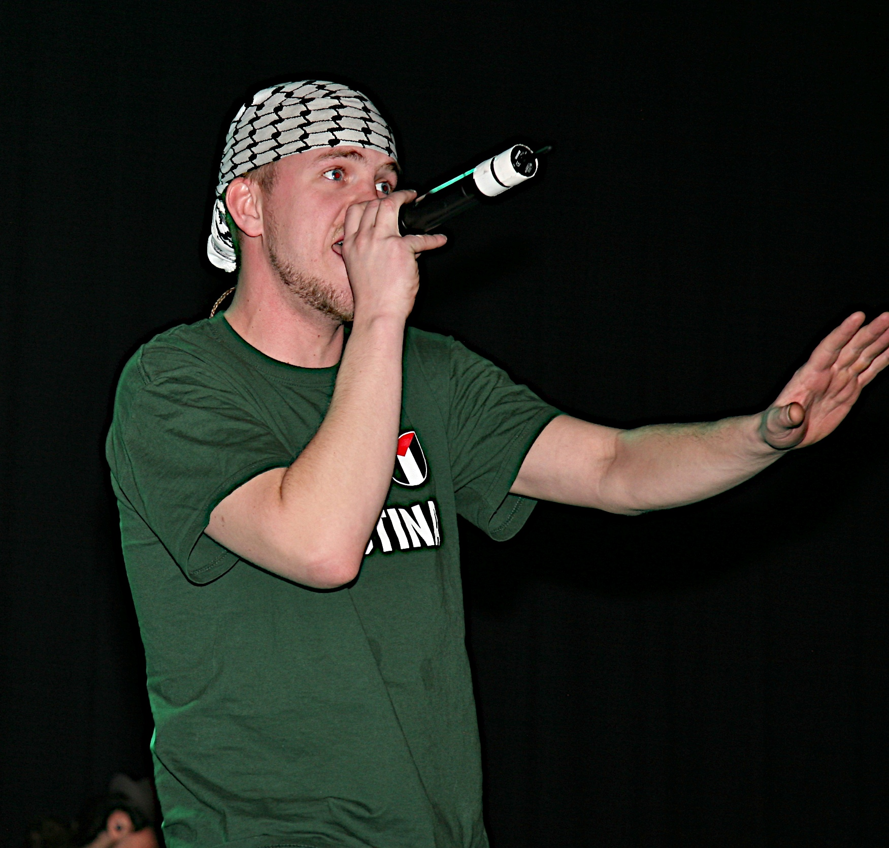 Elling Borgersrud, Gatas Parlament